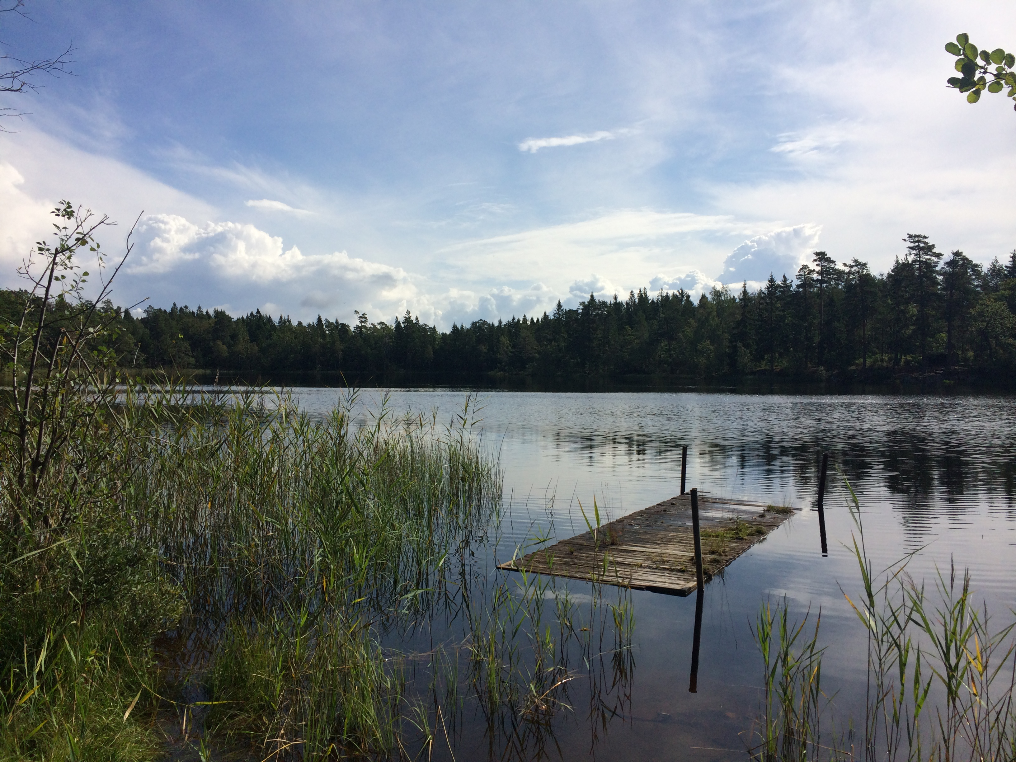 Kvarnsjön, Hunneberg